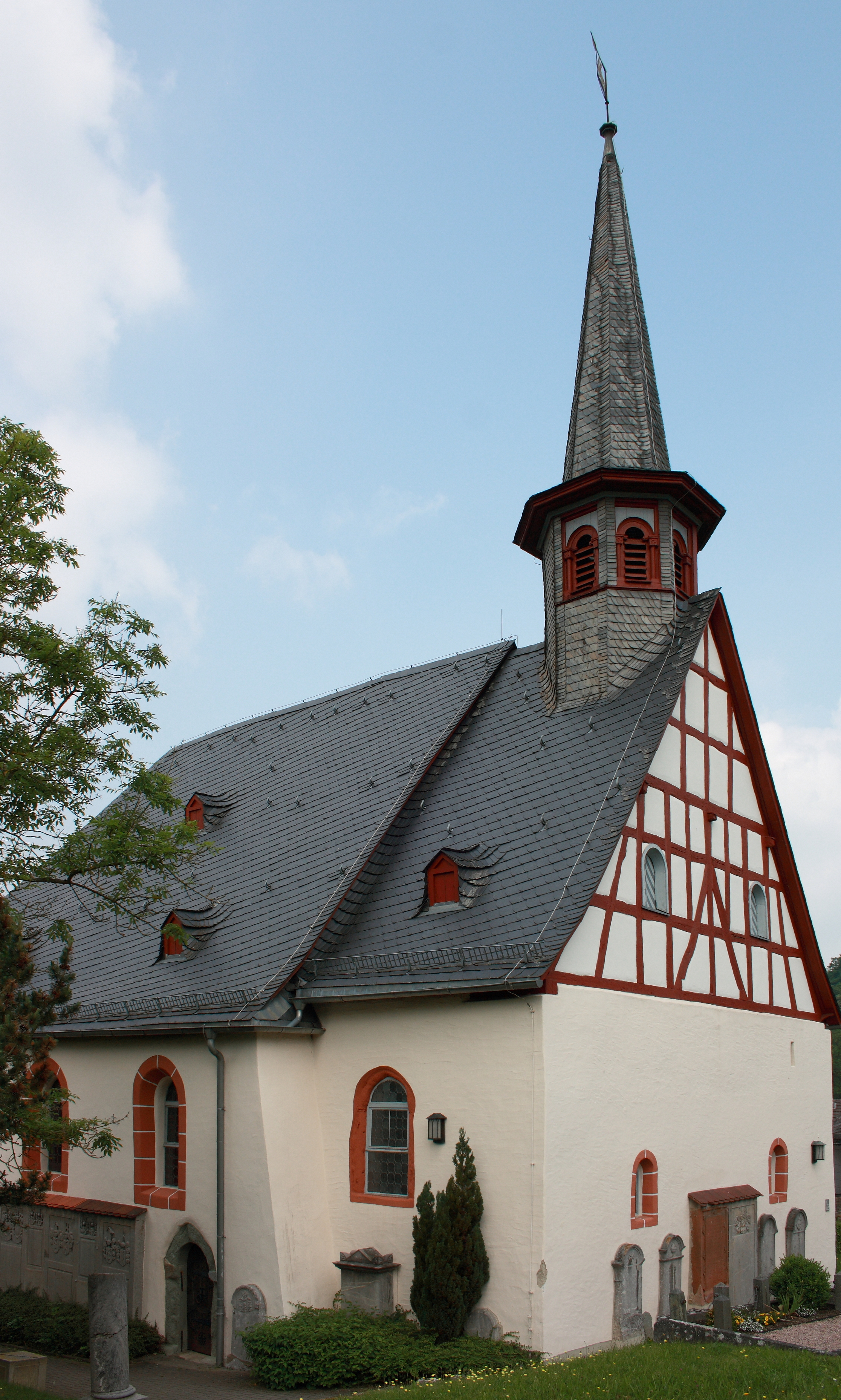 Evangelische Friedhofskirche St. Georgen, St.-Georg-Straße 19, Braunfels, Lahn-Dill-Kreis (Hessen)